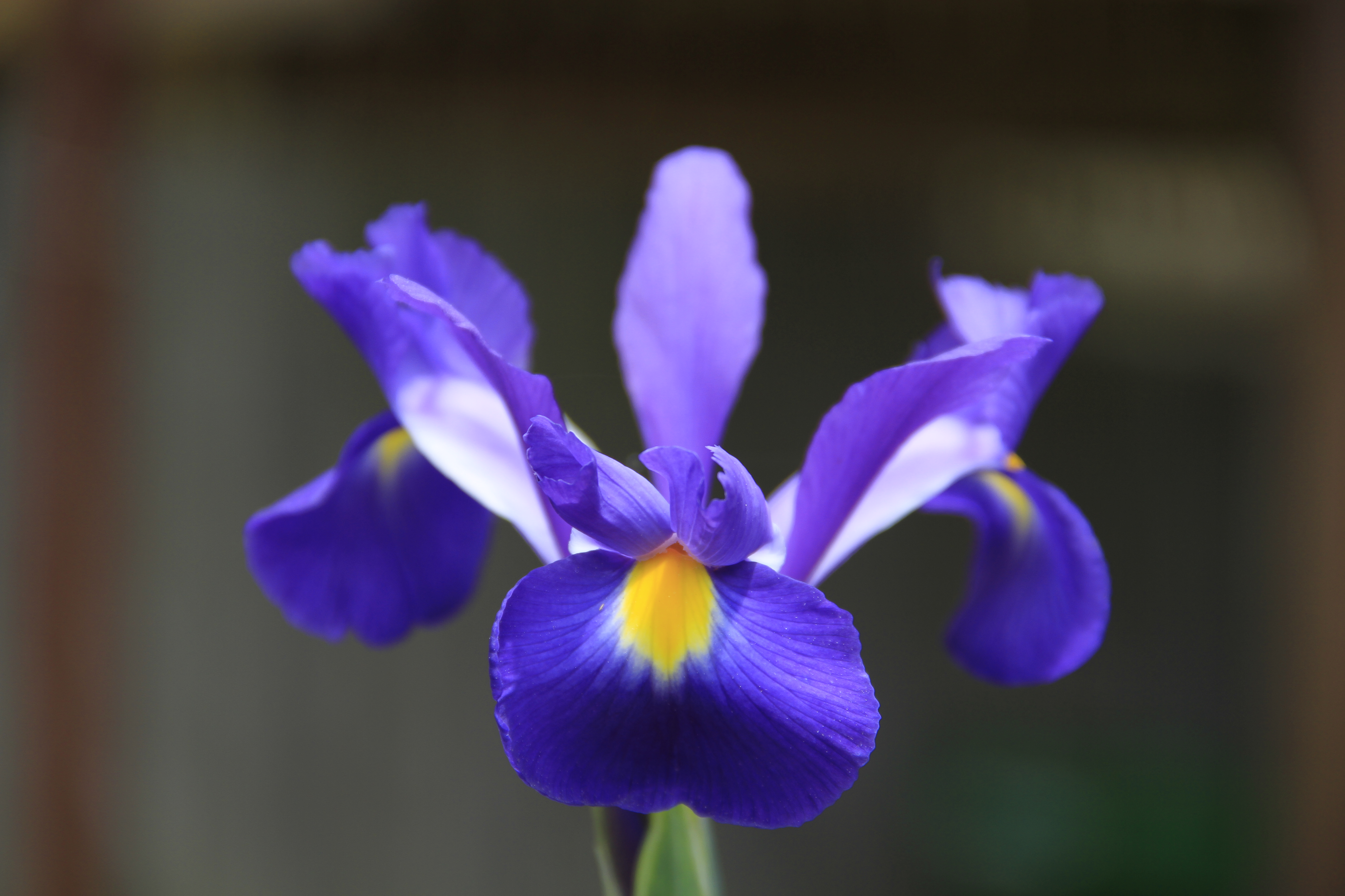 Ксифиум, голландский ирис (Iris tingitana x Iris xiphium)